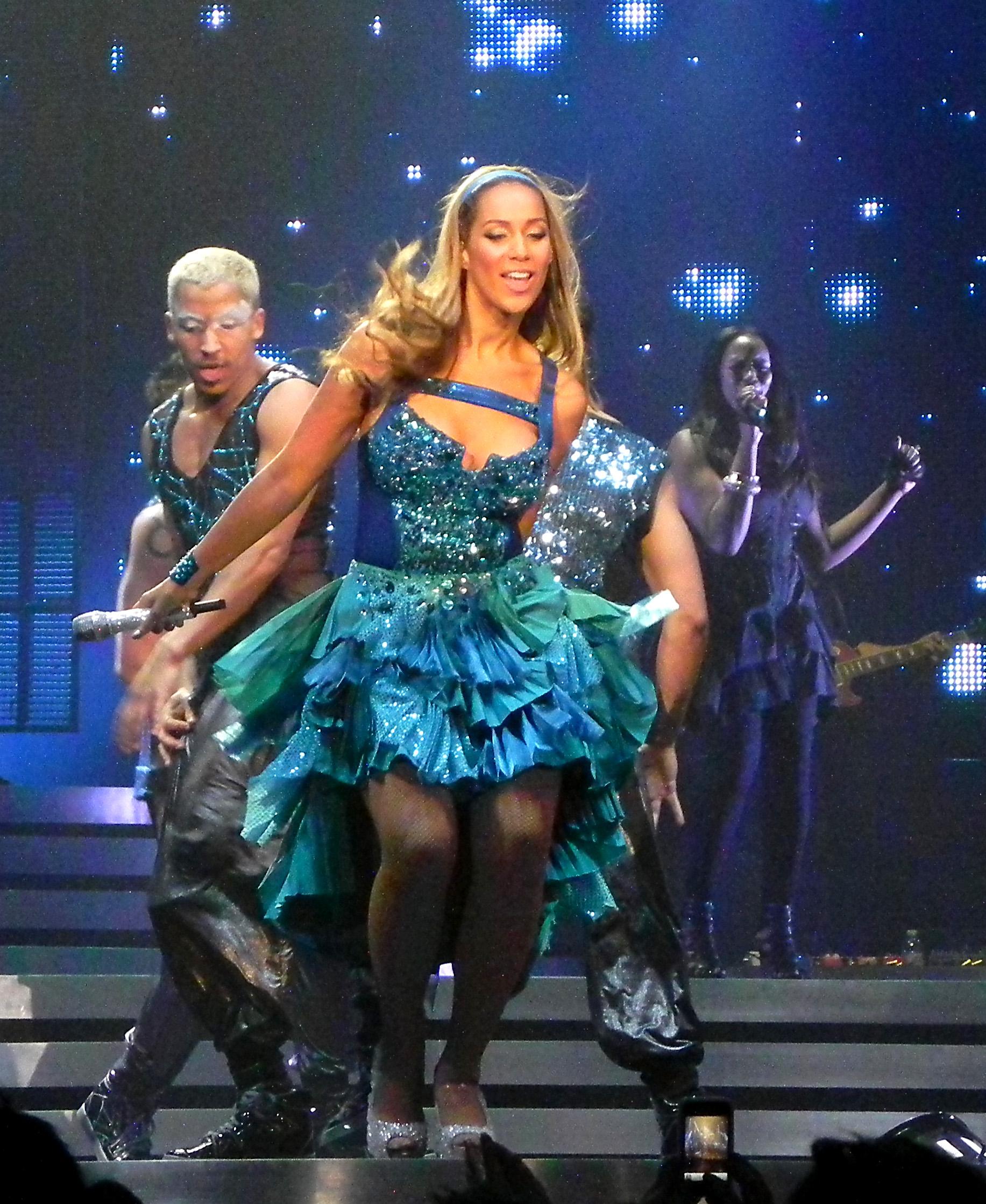 Leona Lewis durante a sua turnê "The Labyrinth" (em português: O Labirinto)